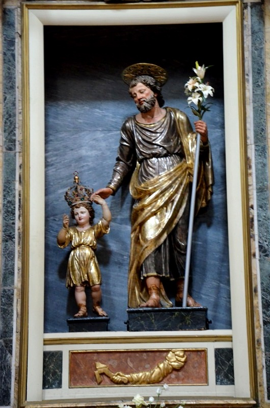 Chiesa di Sant'Oliva ad Alcamo - Interno